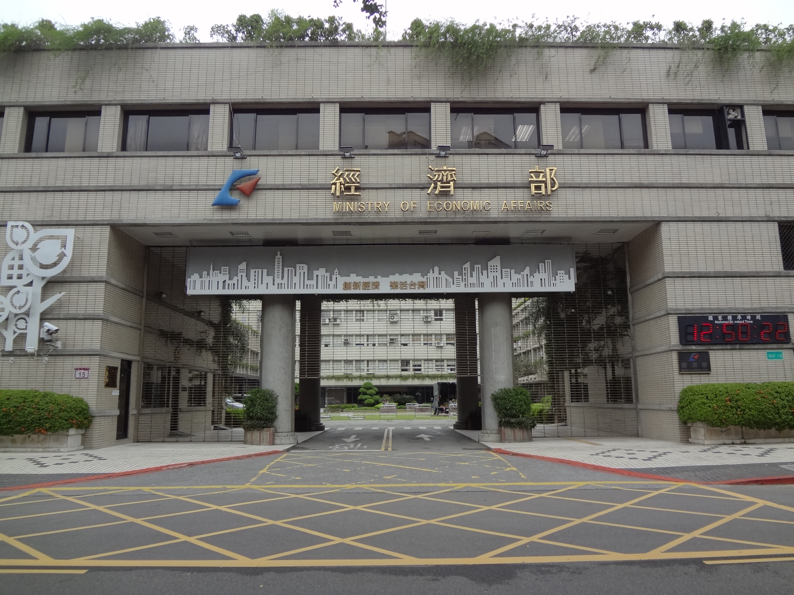 中華民國經濟部大樓大門